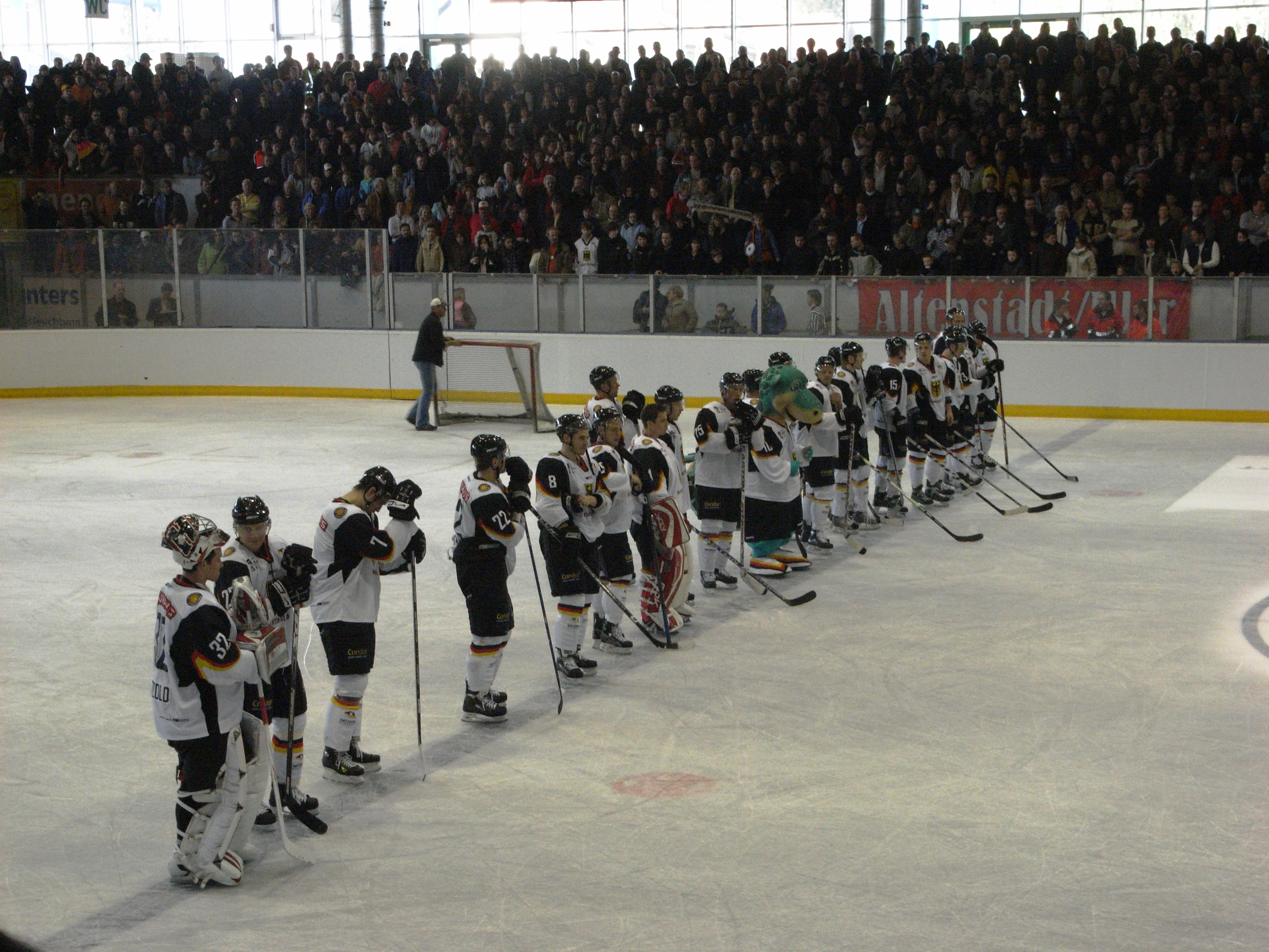 Das Vorbereitungsspiel am 18. April 2009 in Memmingen